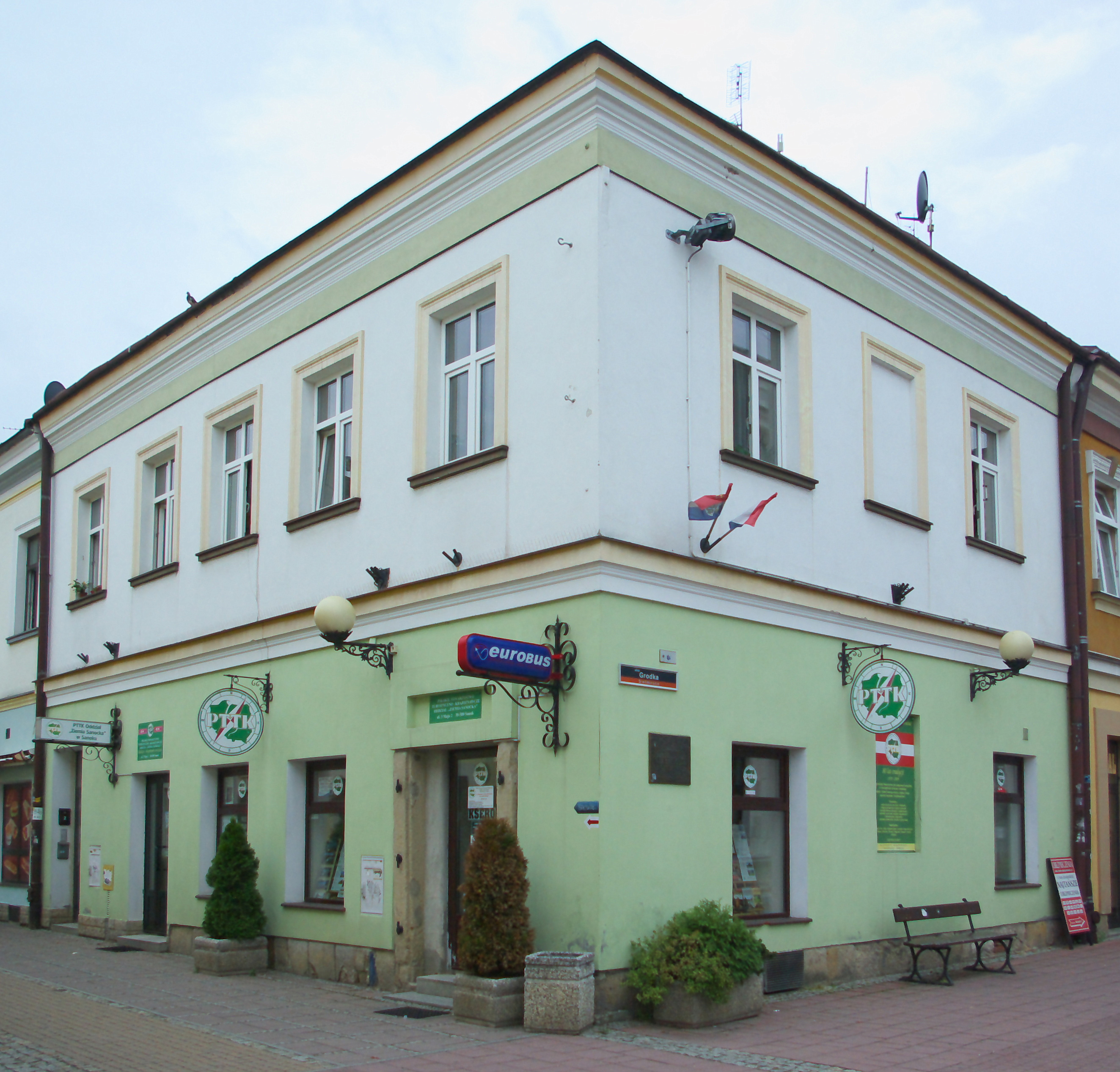 Kamienica przy ul. 3 Maja 2 w Sanoku